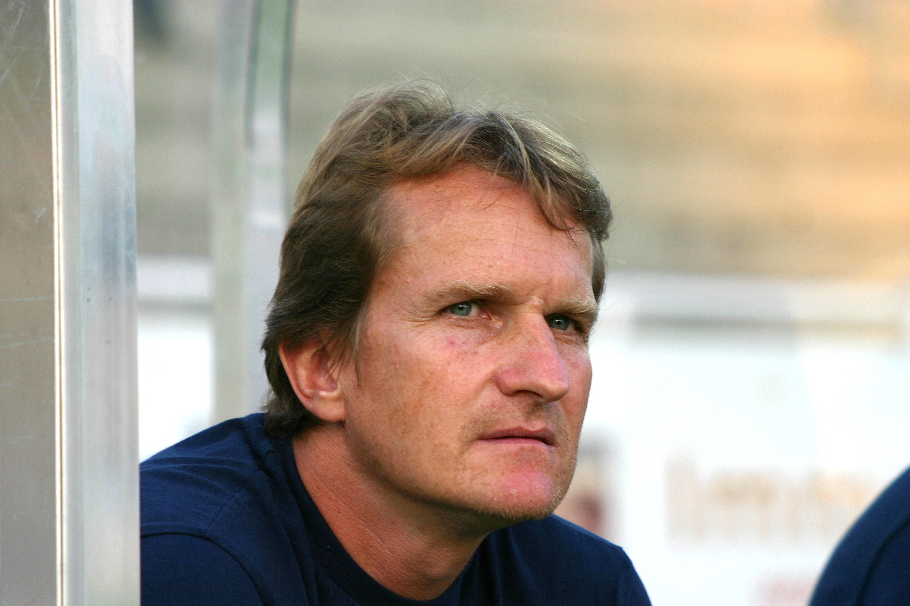 Thomas Janeschitz (FK Austria Wien) – Fußballtrainer der Amateurmannschaft